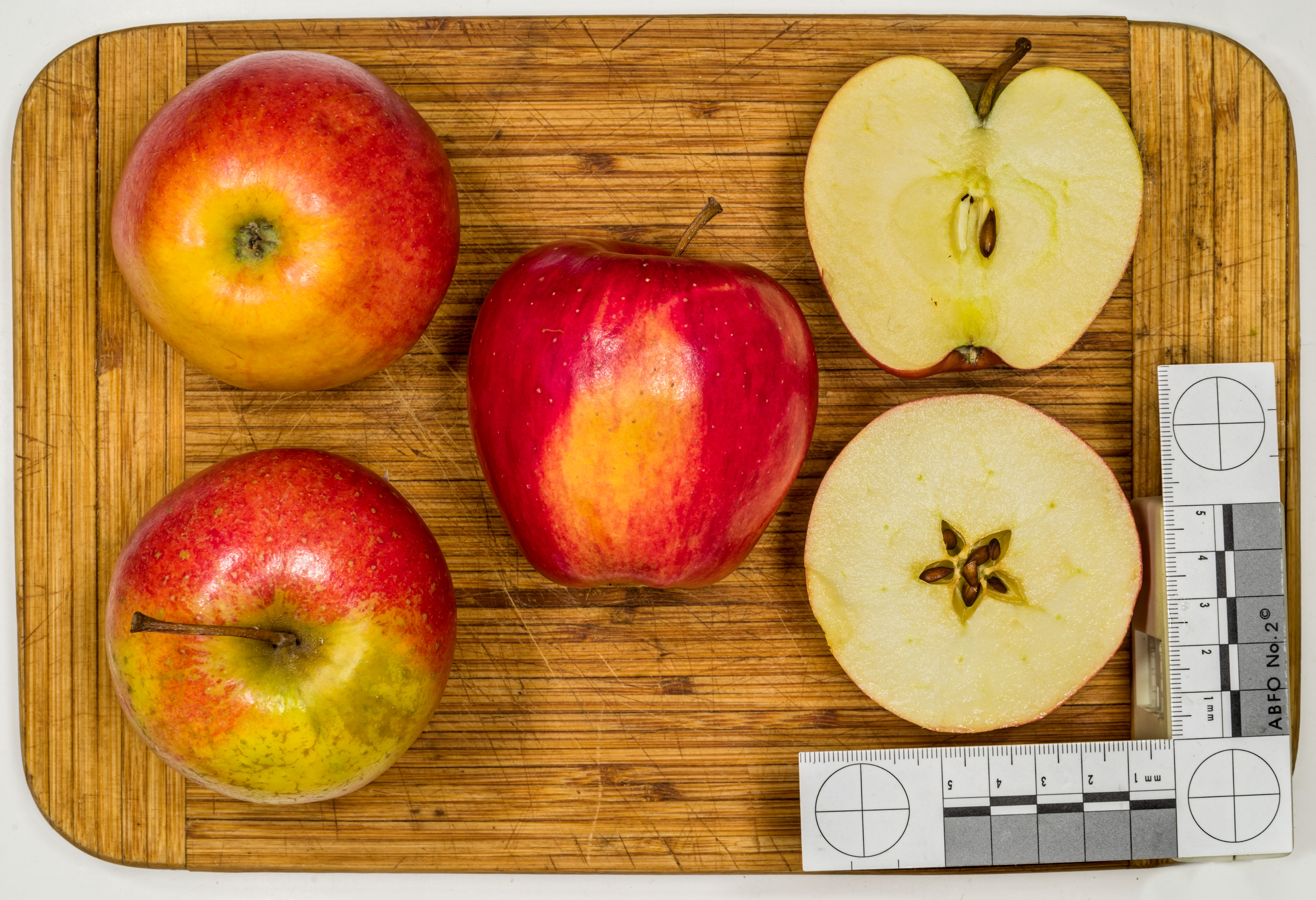 Apfelsorten Evelina, RoHo 3615, Roter Hofman